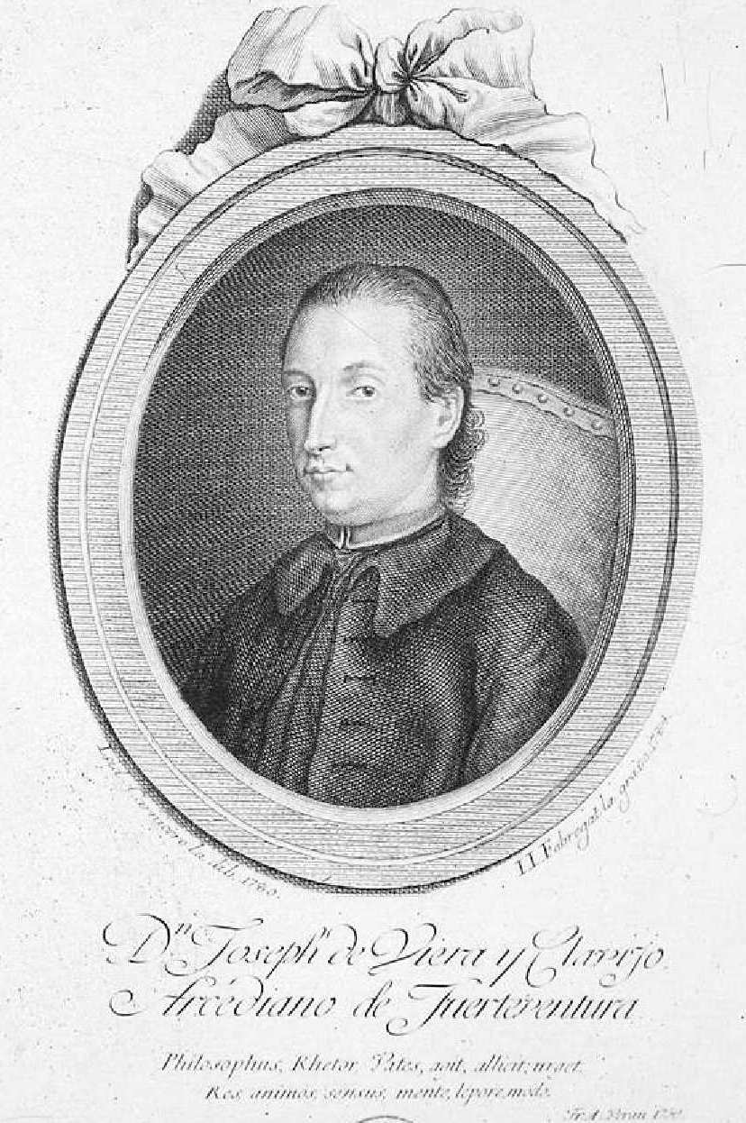 Retrato de José Viera Clavijo, grabado. Inscripción: "Dn. Joseph de Viera y Clavijo, Arcediano de Fuerteventura"